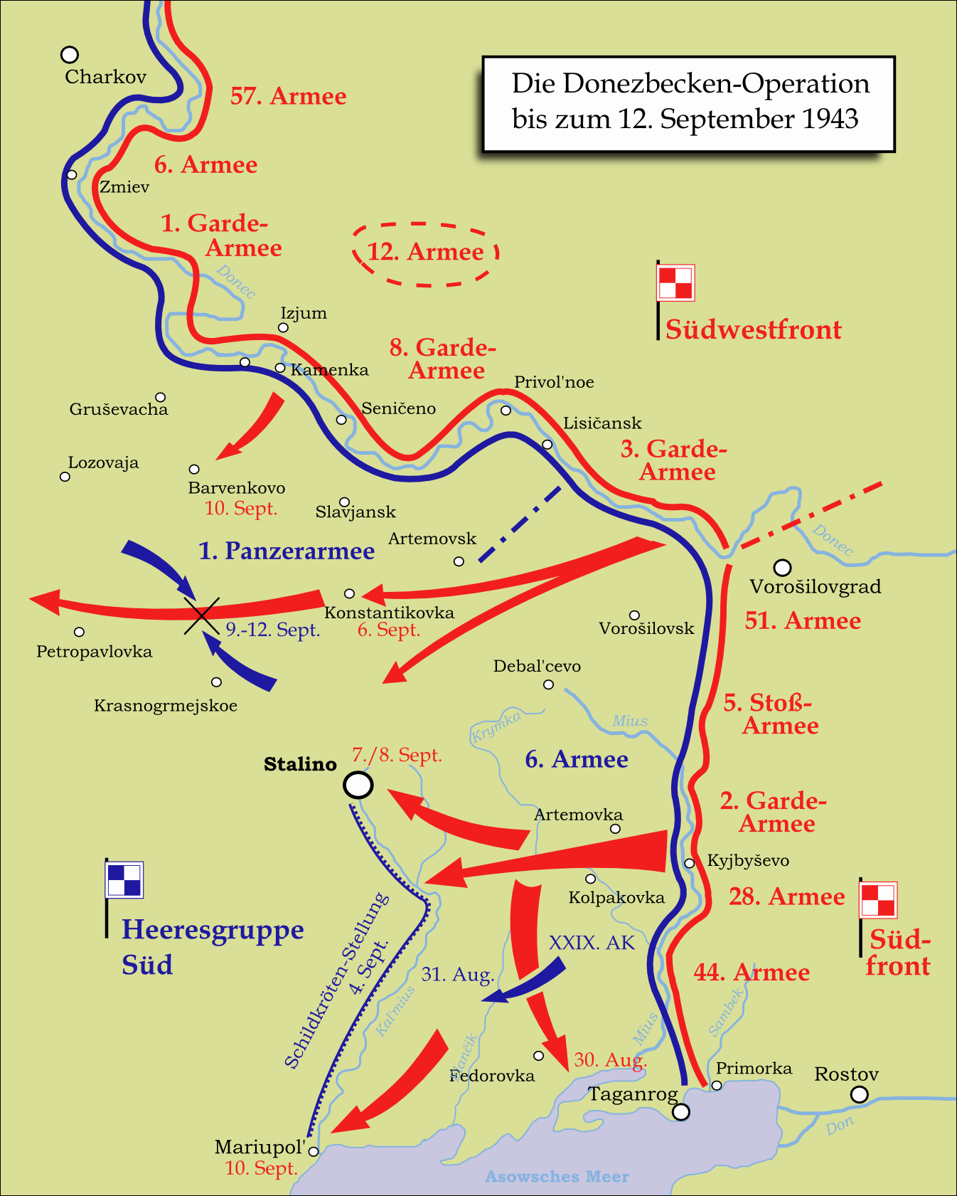 Karte der sowjetischen Offensive im Donezbecken (1943).